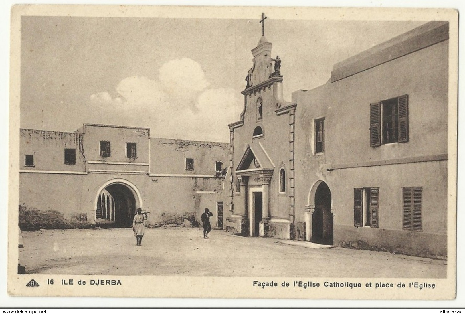 Façade de l'église catholique de Djerba en Tunisie dans les années 30